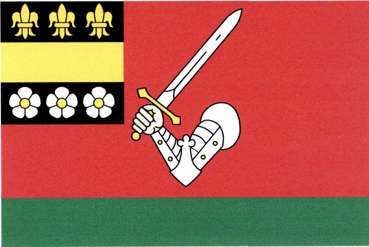 vlajka, Smilovy Hory, okres Tábor